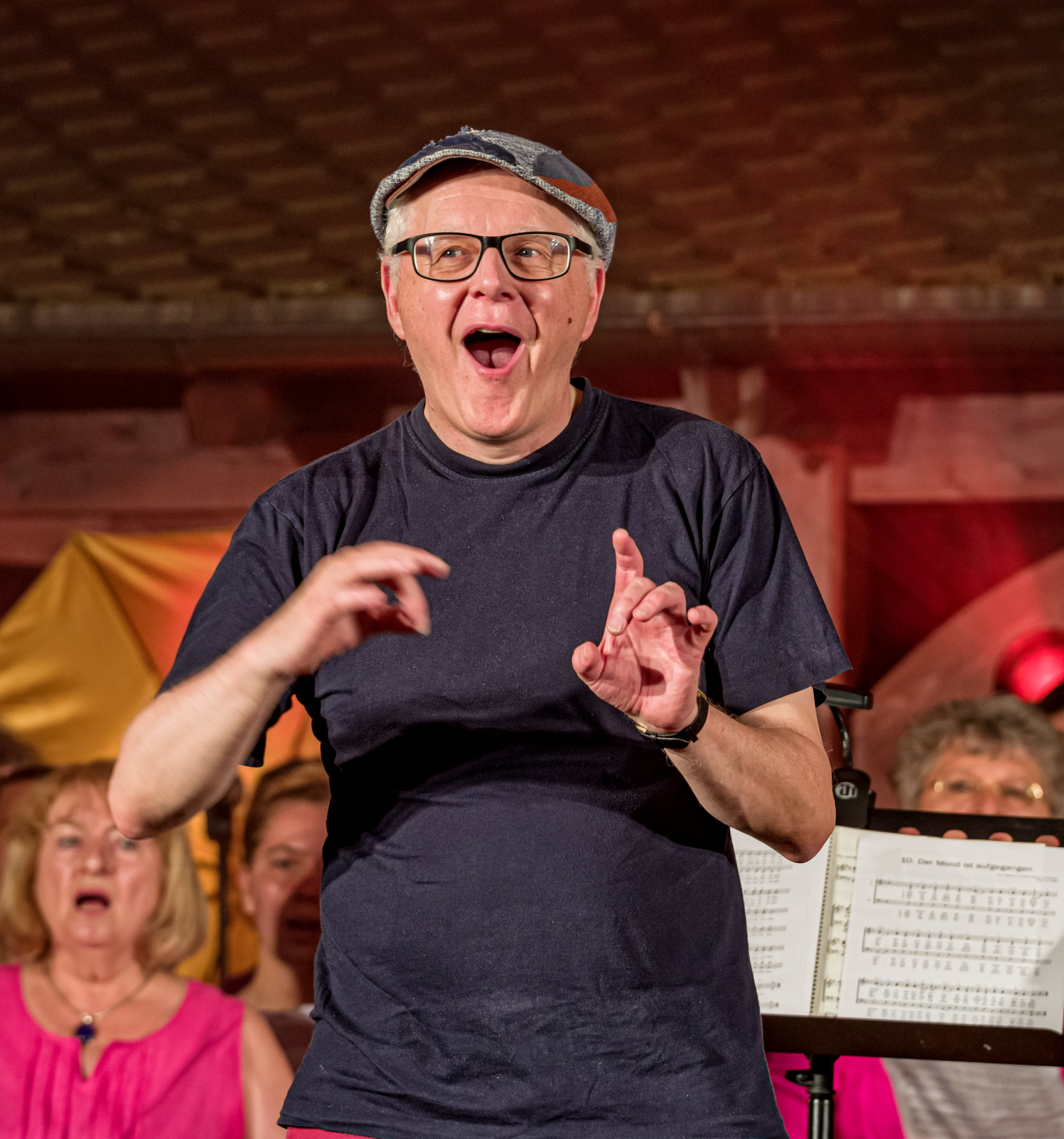 Bilder vom Black Forest Voices Festival in Kirchzarten. Ein Festival mit Workshops für Chöre und A Capella Gesang vom 27. 6. 2019 zum 30.06. 2019